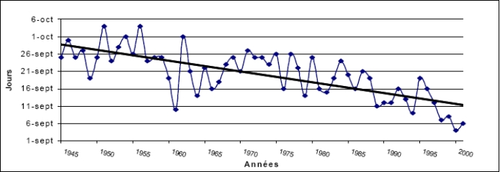 Dates des vendanges dans la région de Chateauneuf-du-Pape entre 1945 et 2000